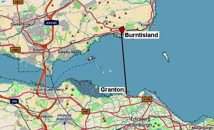 Fährverbindung